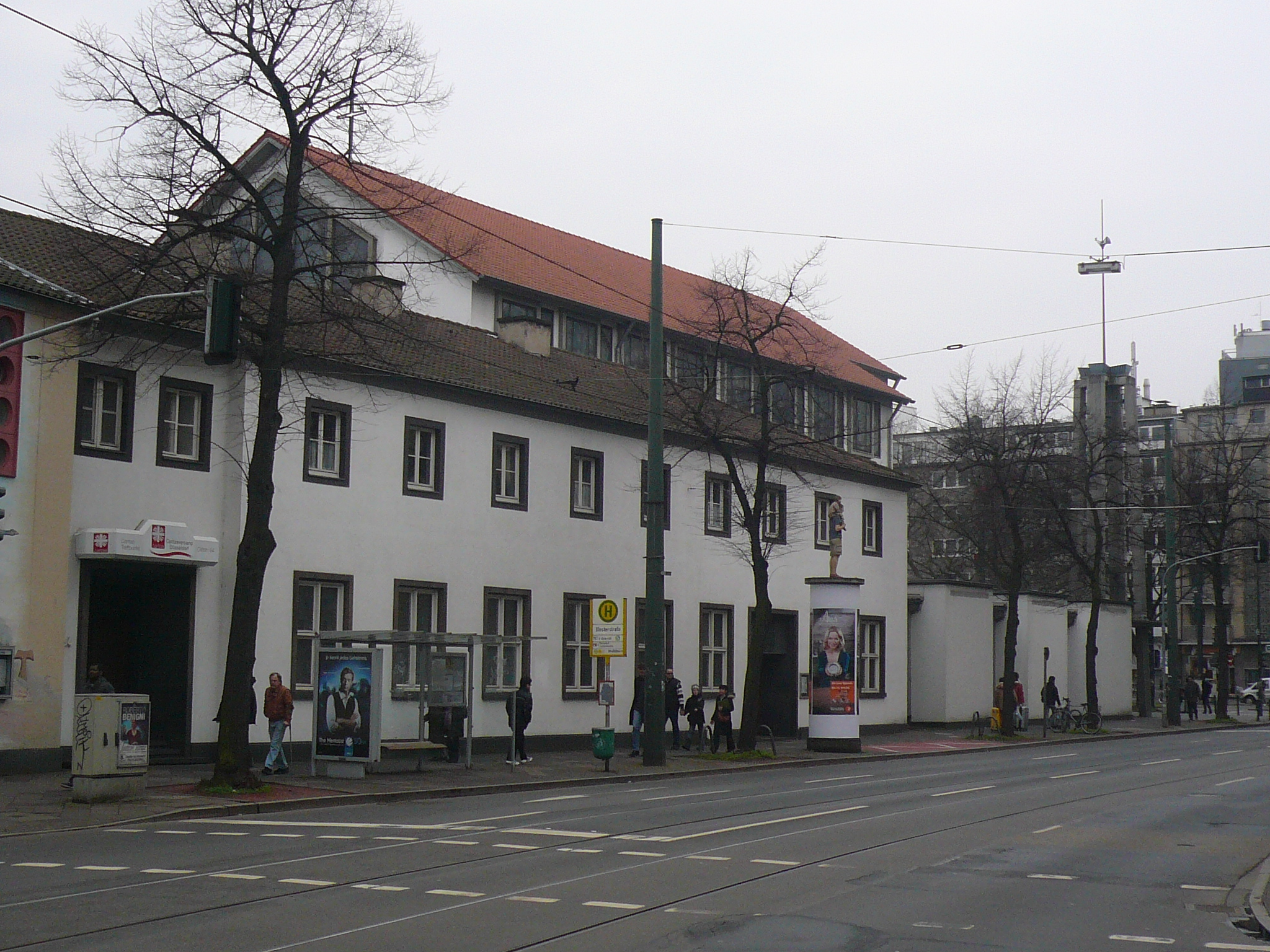 Franziskanerkloster Düsseldorf-Stadtmitte (2017 abgerissen, da mittlerweile baufällig ([1])